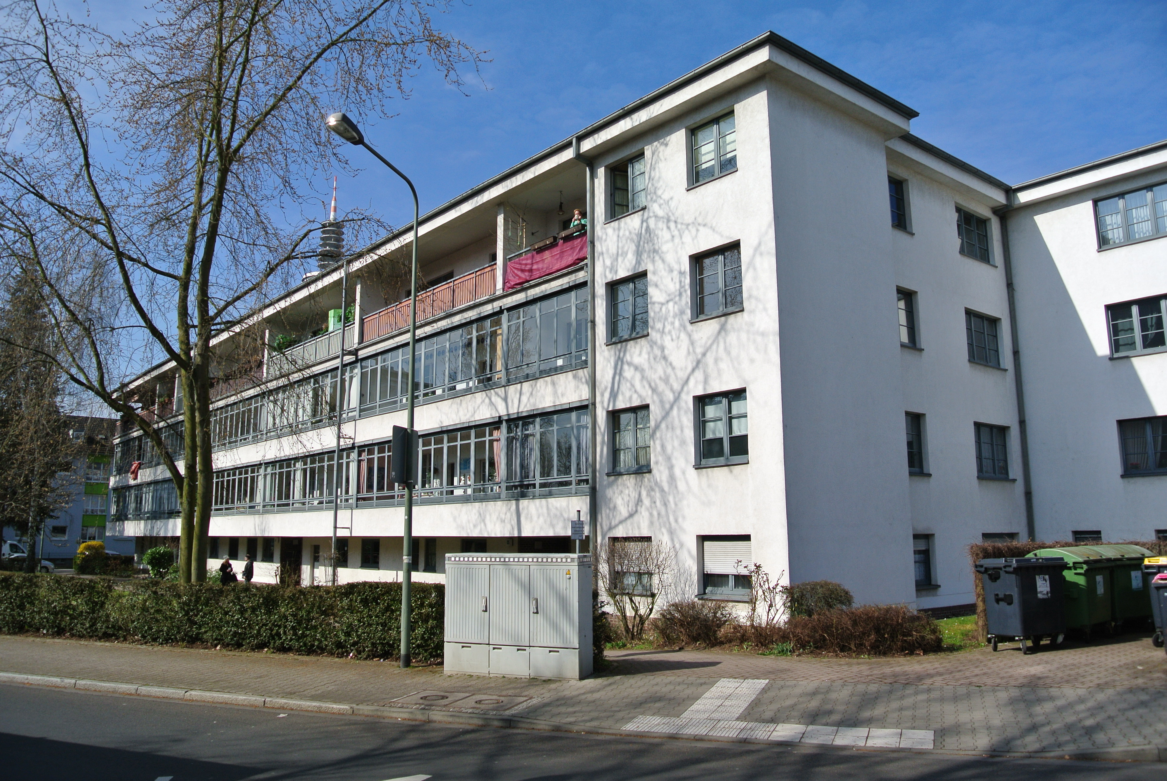 Siedlung Raimundstraße in Frankfurt-Dornbusch, 1928, Fallerslebenstraße von Osten